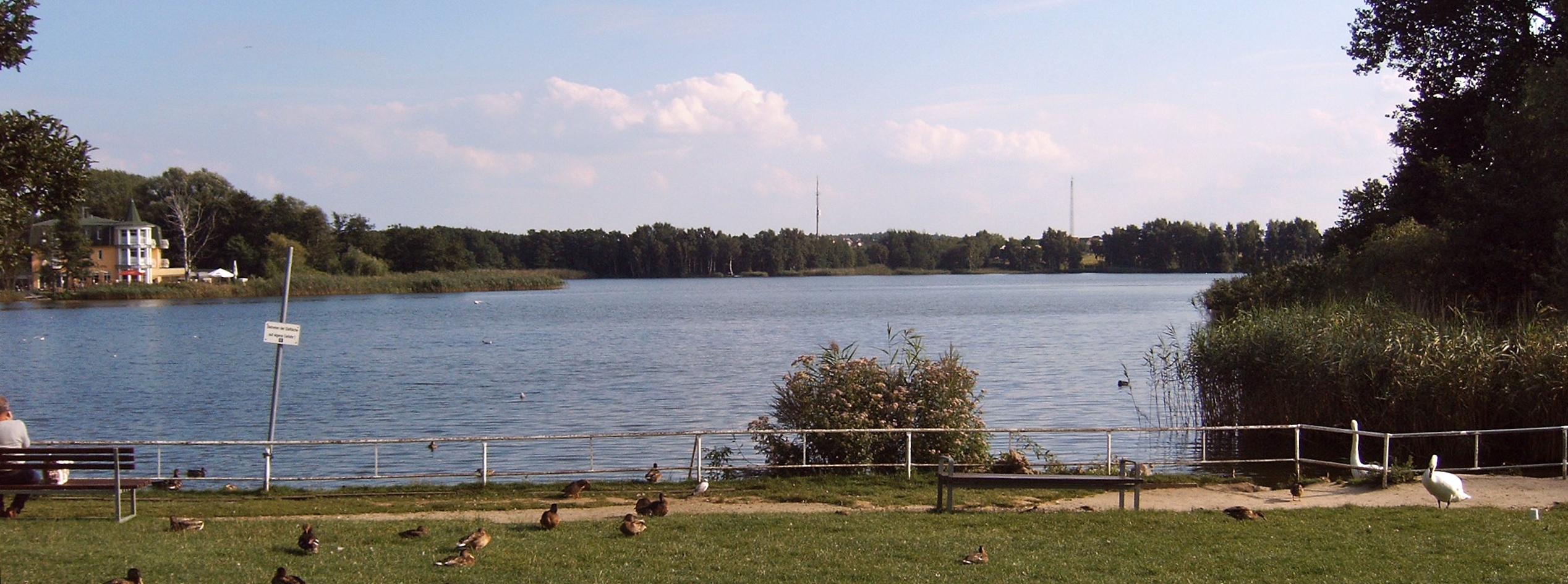 Schloonsee, Bansin, Gemeinde Heringsdorf, Standpunkt Waldstraße